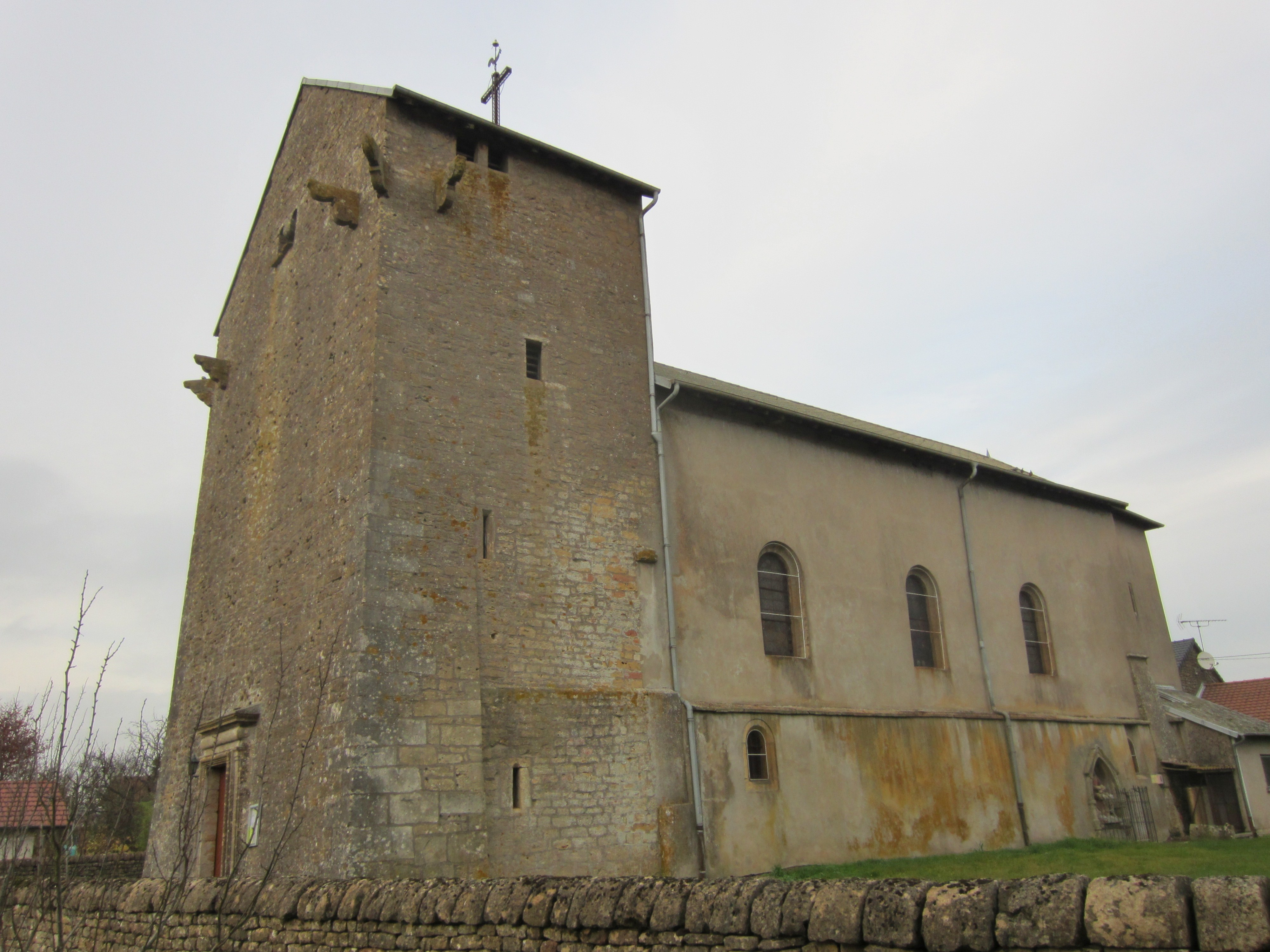 Description eglise Bazailles eglise Bazailles